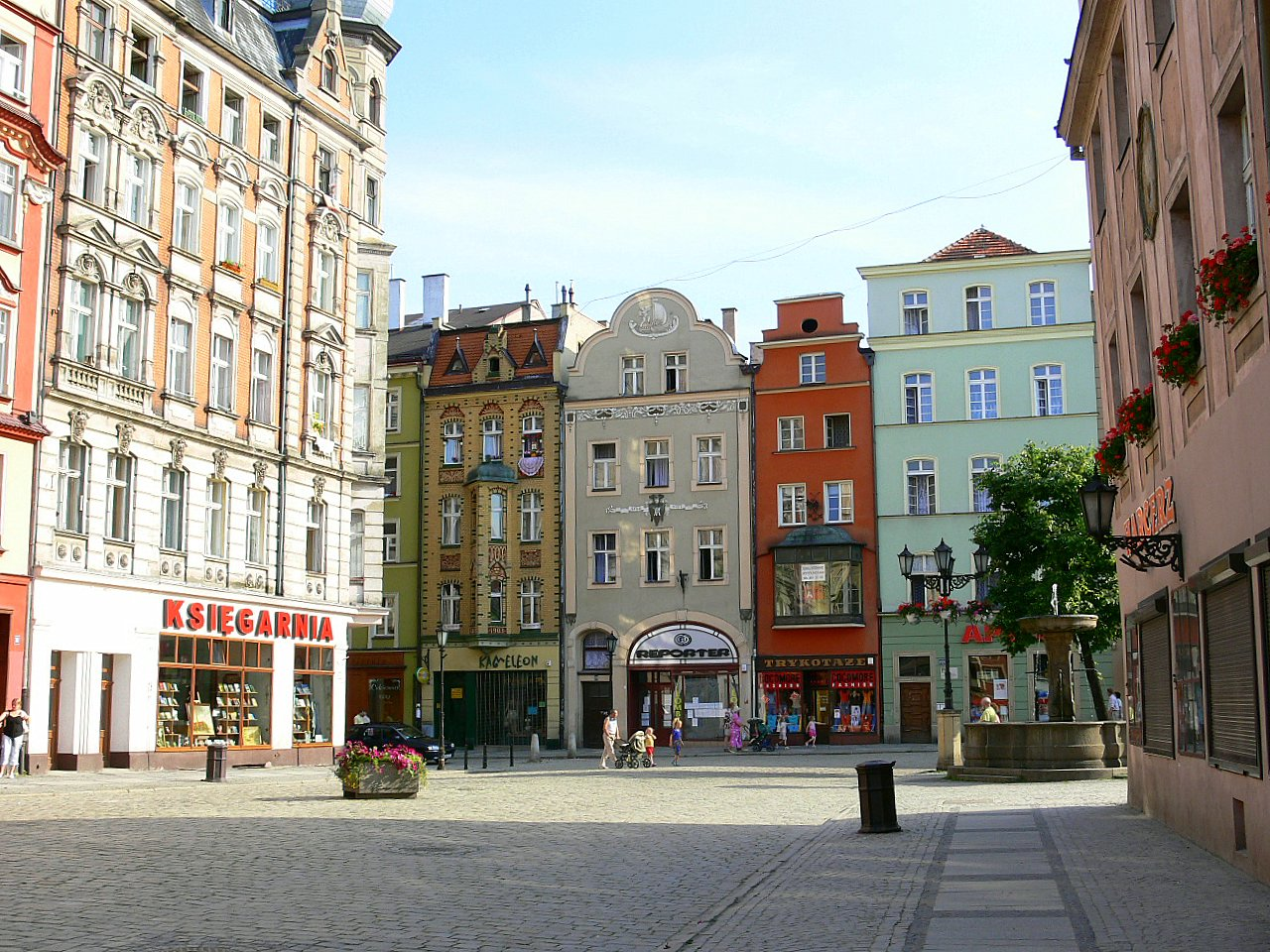 Świdnica - rynek